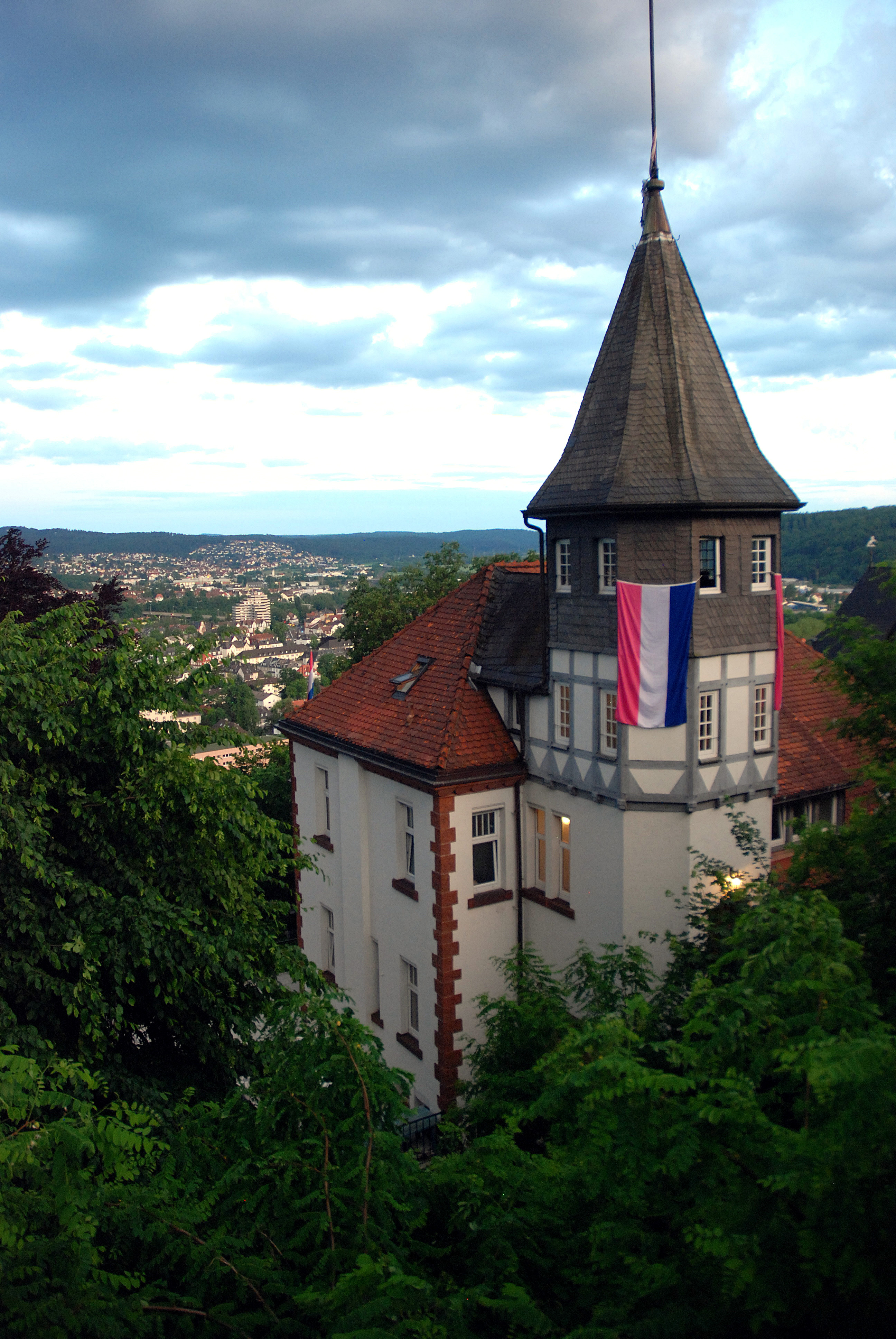 Philipperhaus